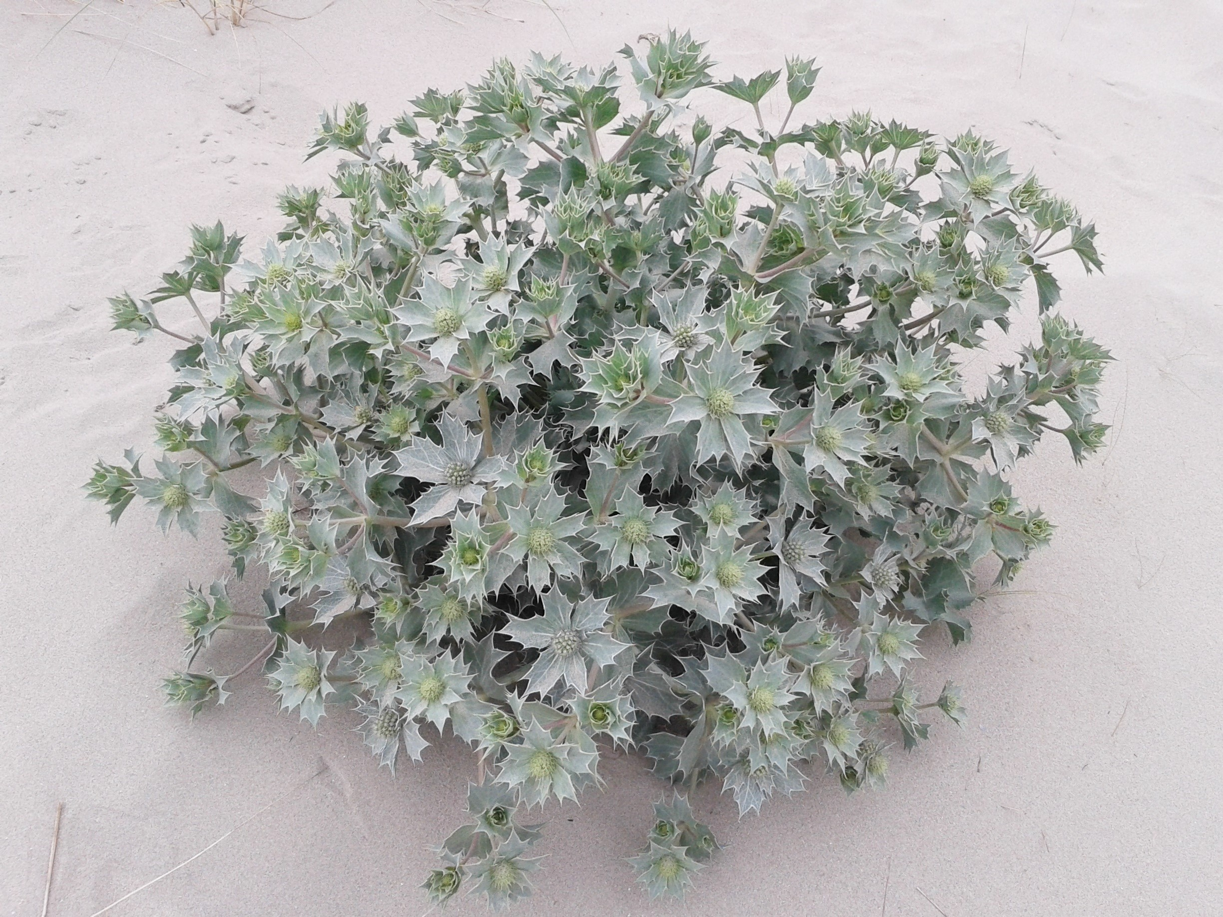 Probablement Eryngium maritimum